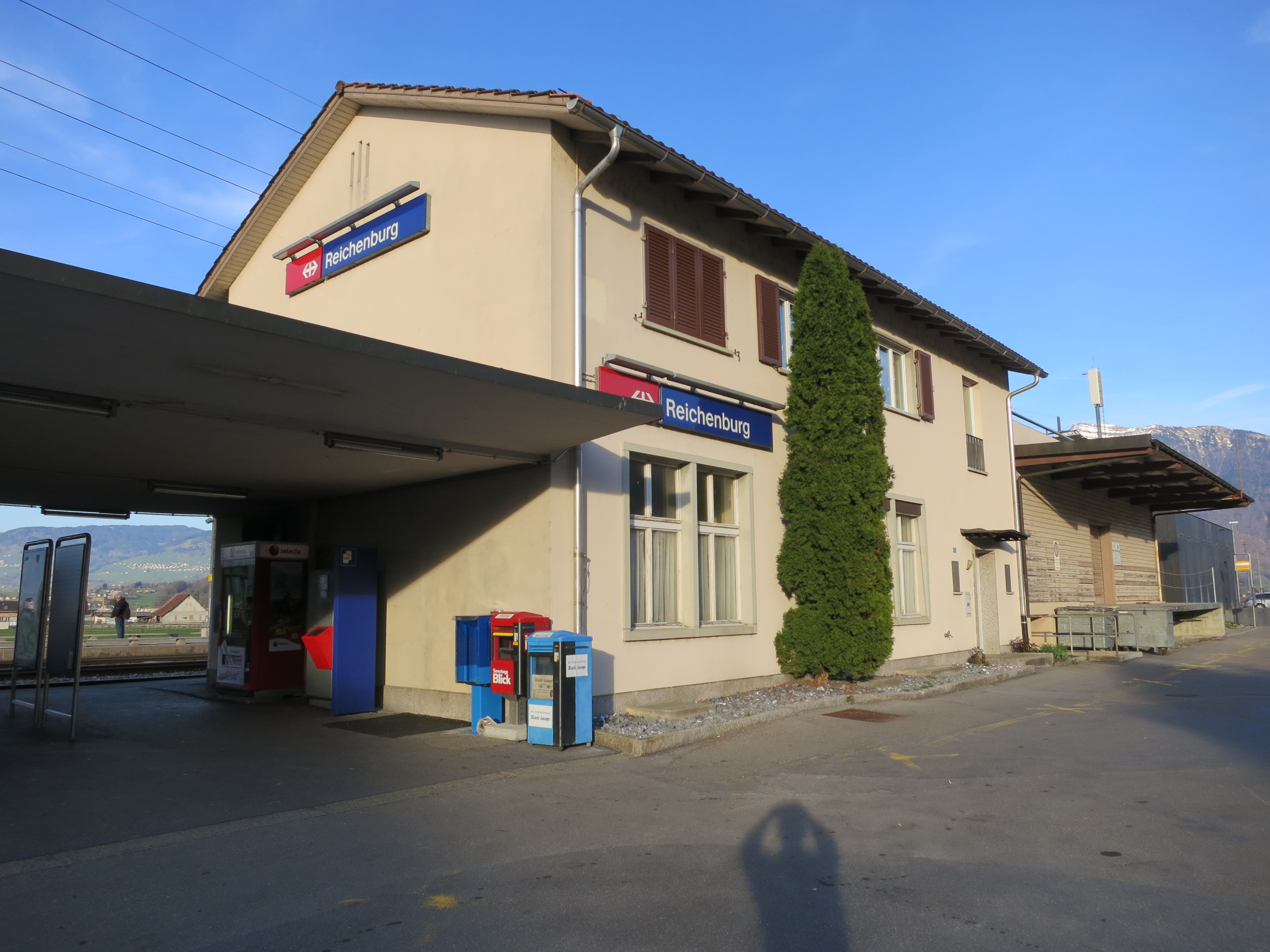 Bahnhof Reichenburg SZ, Schweiz